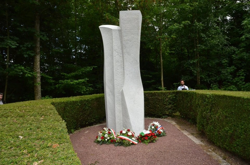 אנדרטה לזכרו של קרלו רוסלי במקום שבו נרצח בצרפת